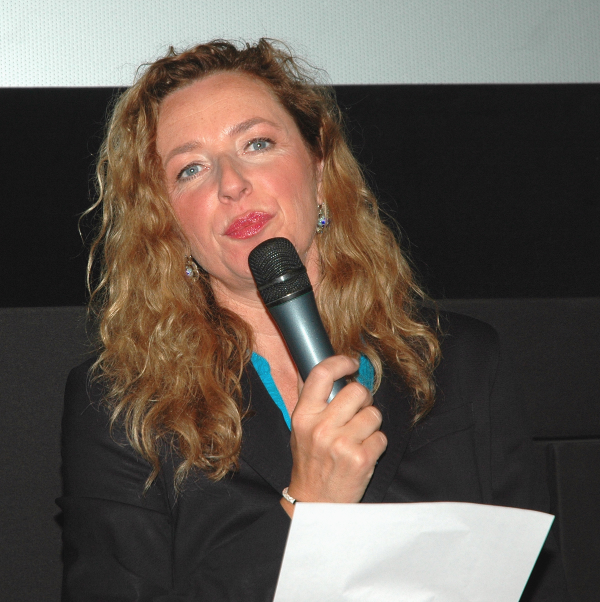 Diana Iljine bei der PresseKonferenz zum Start des Filmfest 2014 in München